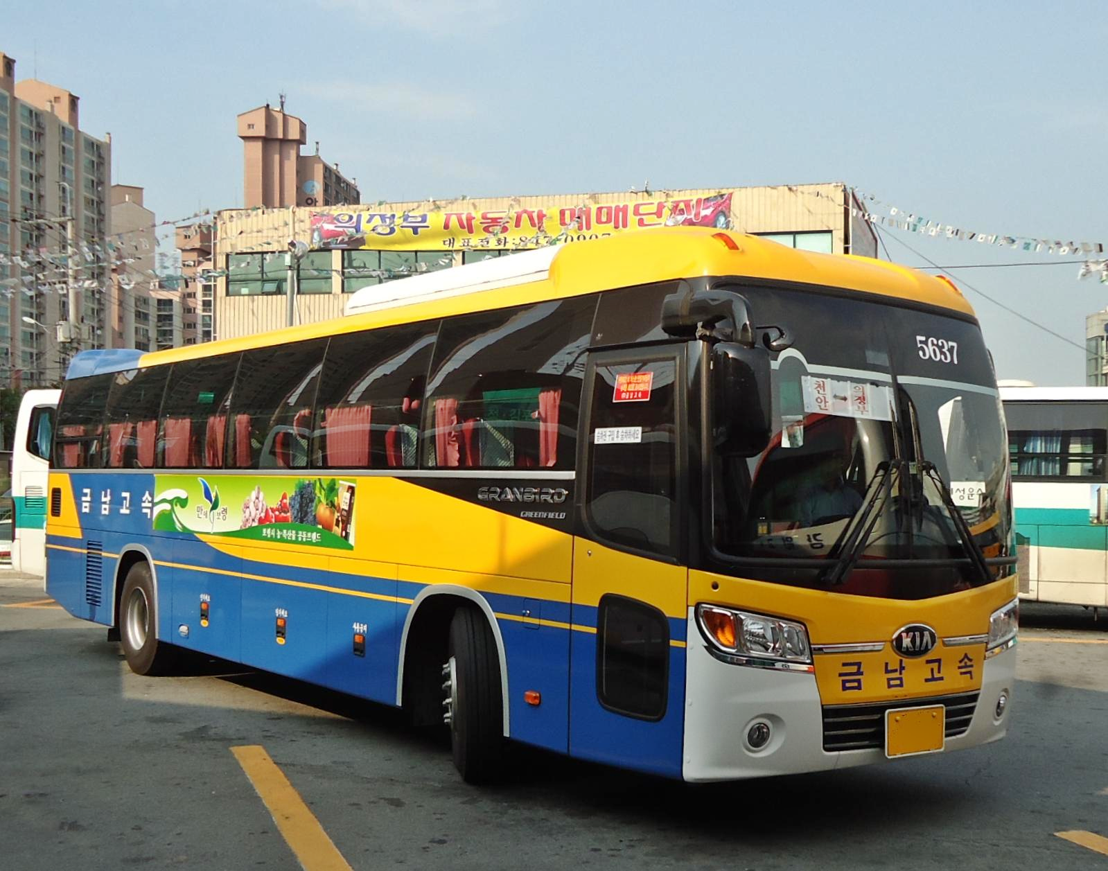 금남고속 뉴 그랜버드 그린필드 2013년식